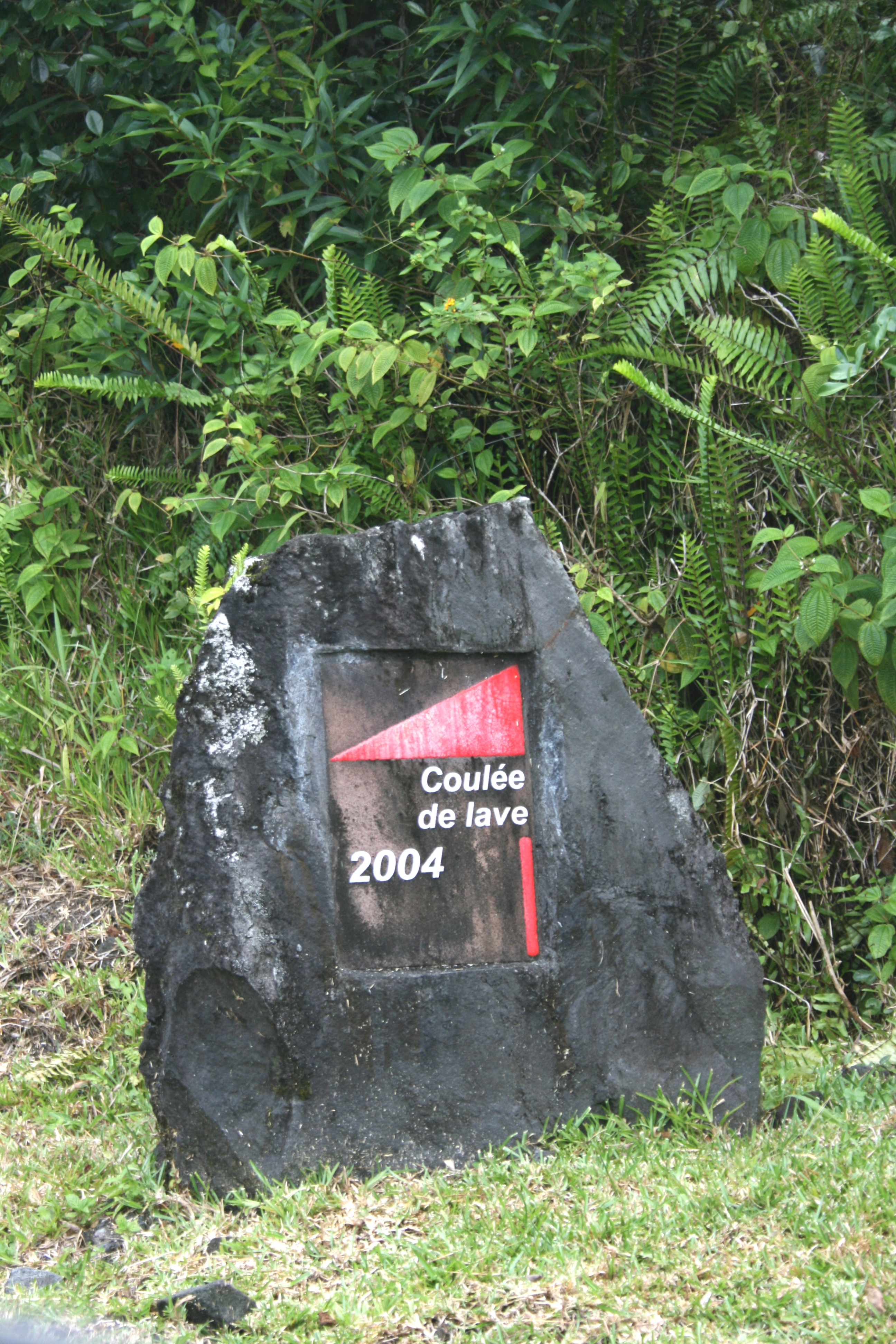 Stèle indiquant une coulée de 2004 le long de la routes des Laves, à Sainte-Rose de La Réunion.